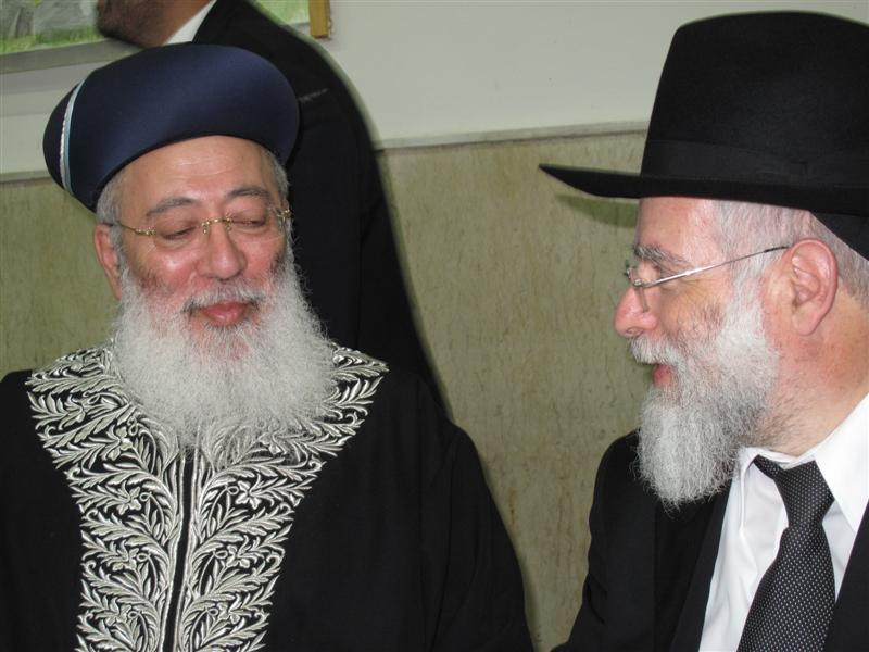 ישיבת מרכז הרב.